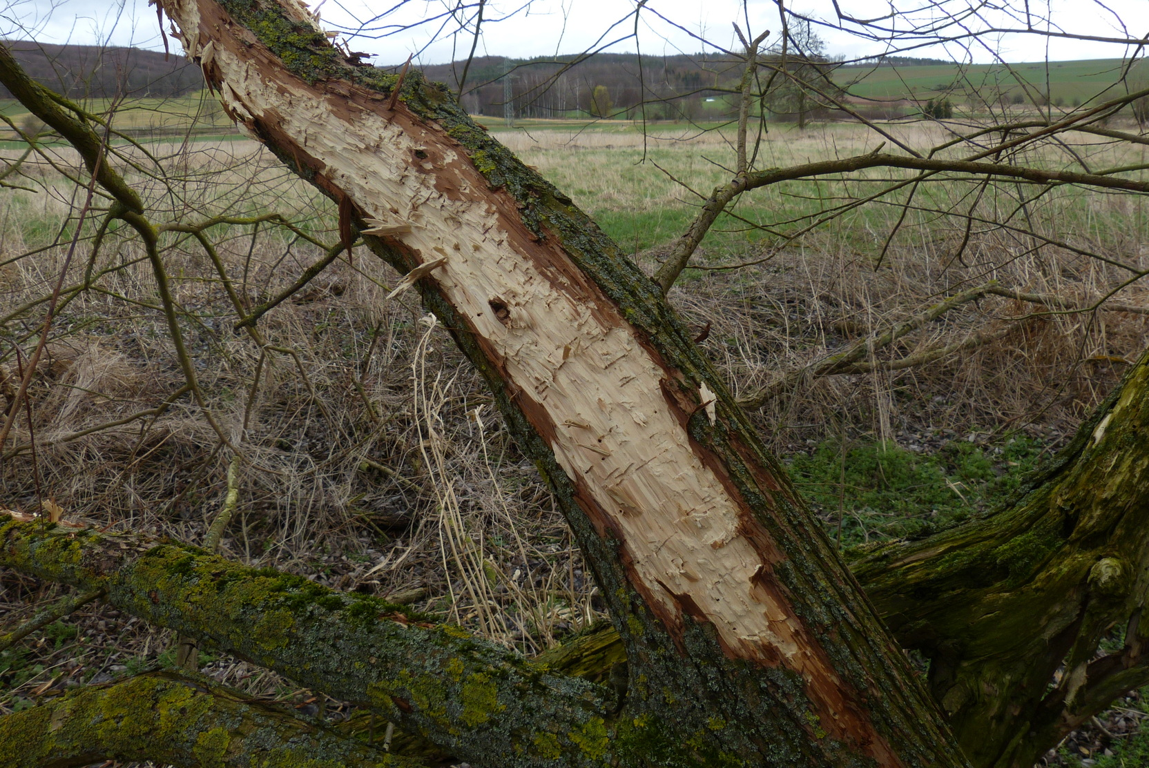 diesen Ast einer Weide hat zunächst der Biber "gefällt", also zumindest die Rinde in Biber-Manier komplett unten abgenagt. Nach Absterben des Astes kam ca. 1 Jahr später der Schwarzspecht und hat diese Spuren hinterlassen, also den toten Ast großflächig entrindet.